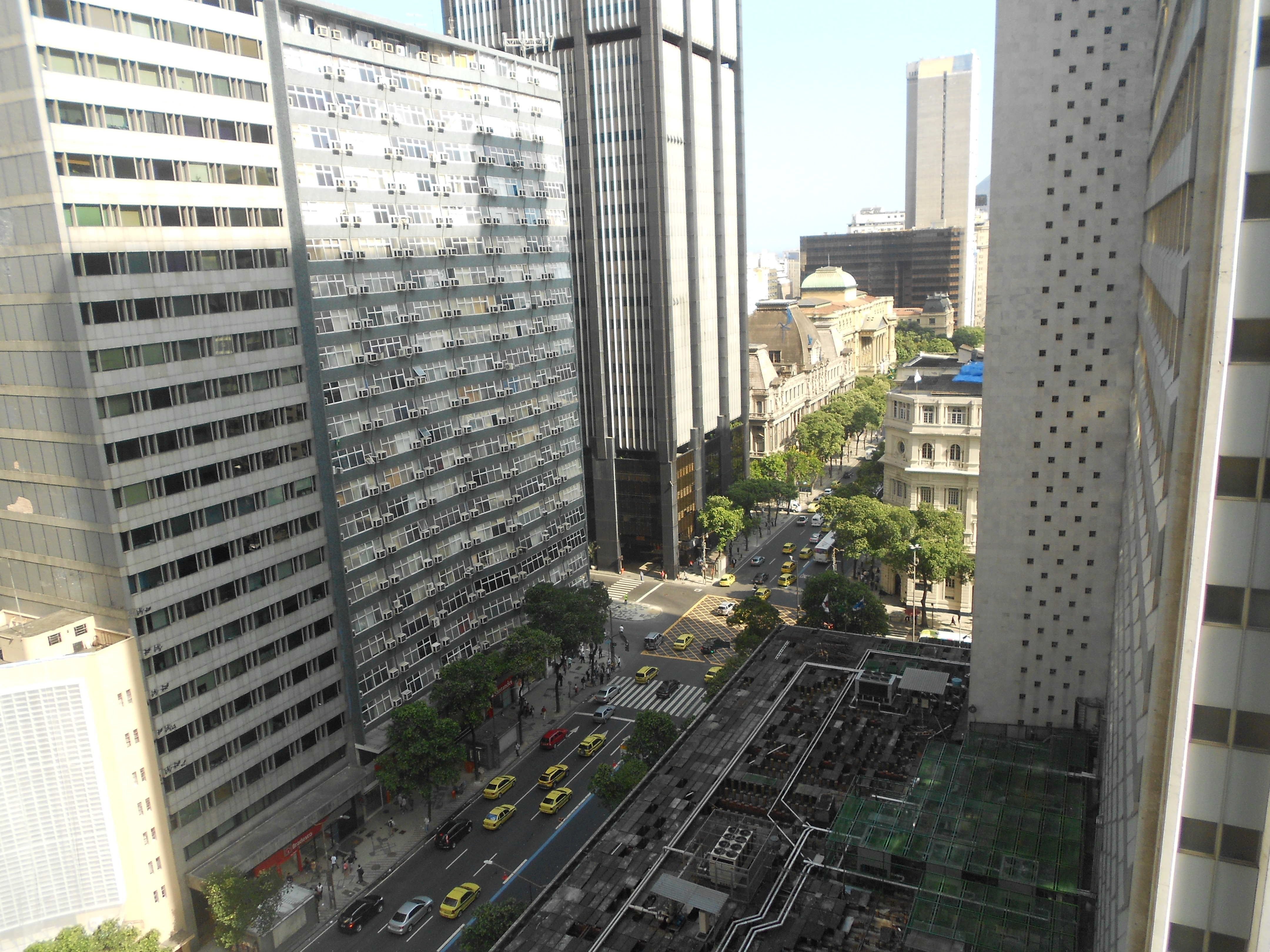 Vista da Avenida Rio Branco, no Centro do Rio de Janeiro, Brasil.